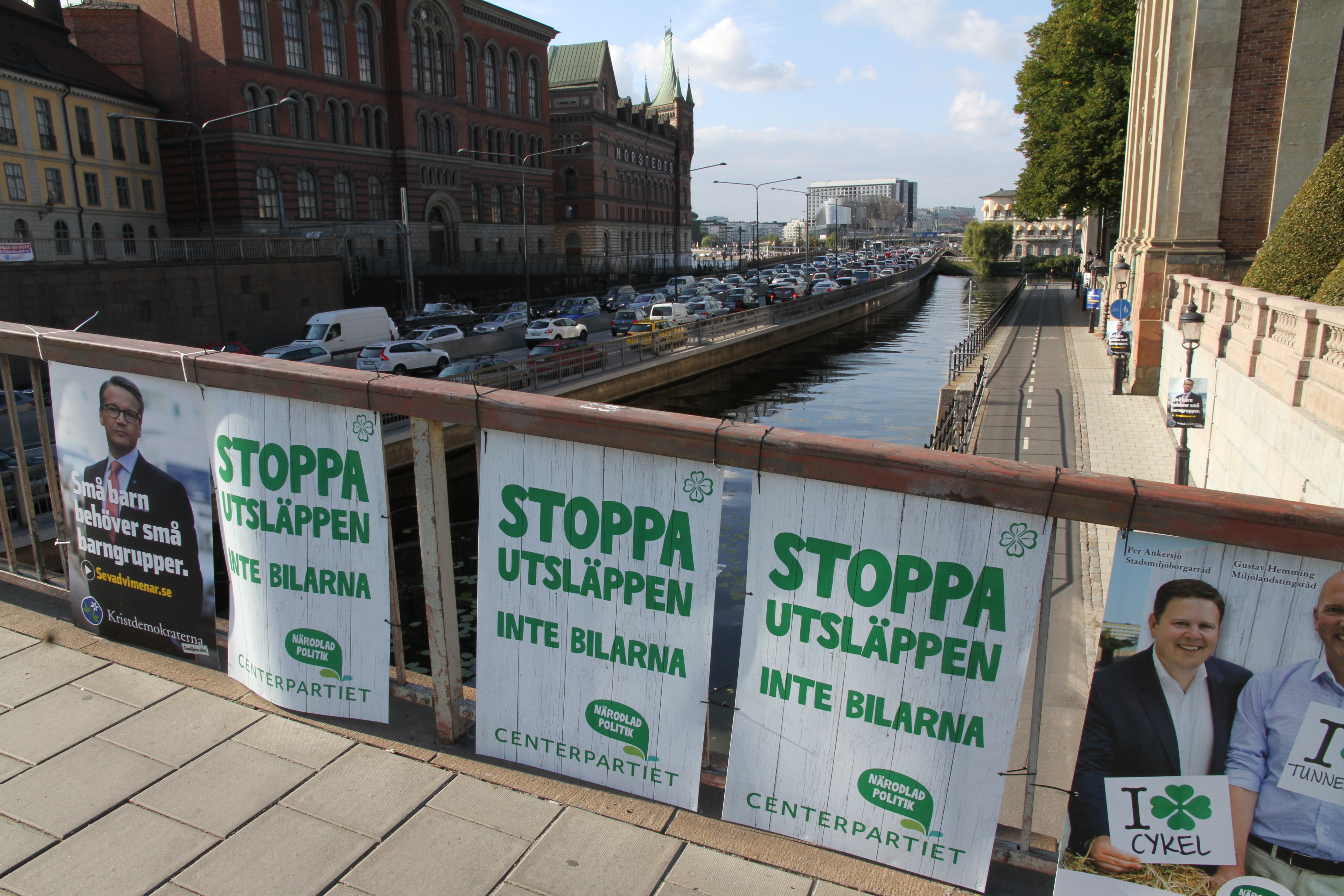 Valrörelsen 2014. Valaffischer Riddarholmsbron, Stockholm 13 september 2014. Centerpartiet.